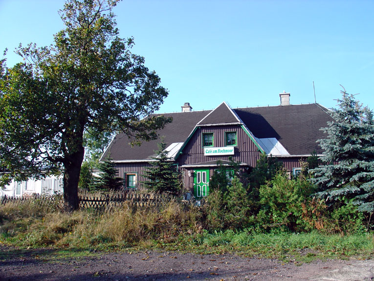 Zinnwald, Erzgebirge, Cafe am Hochmoor